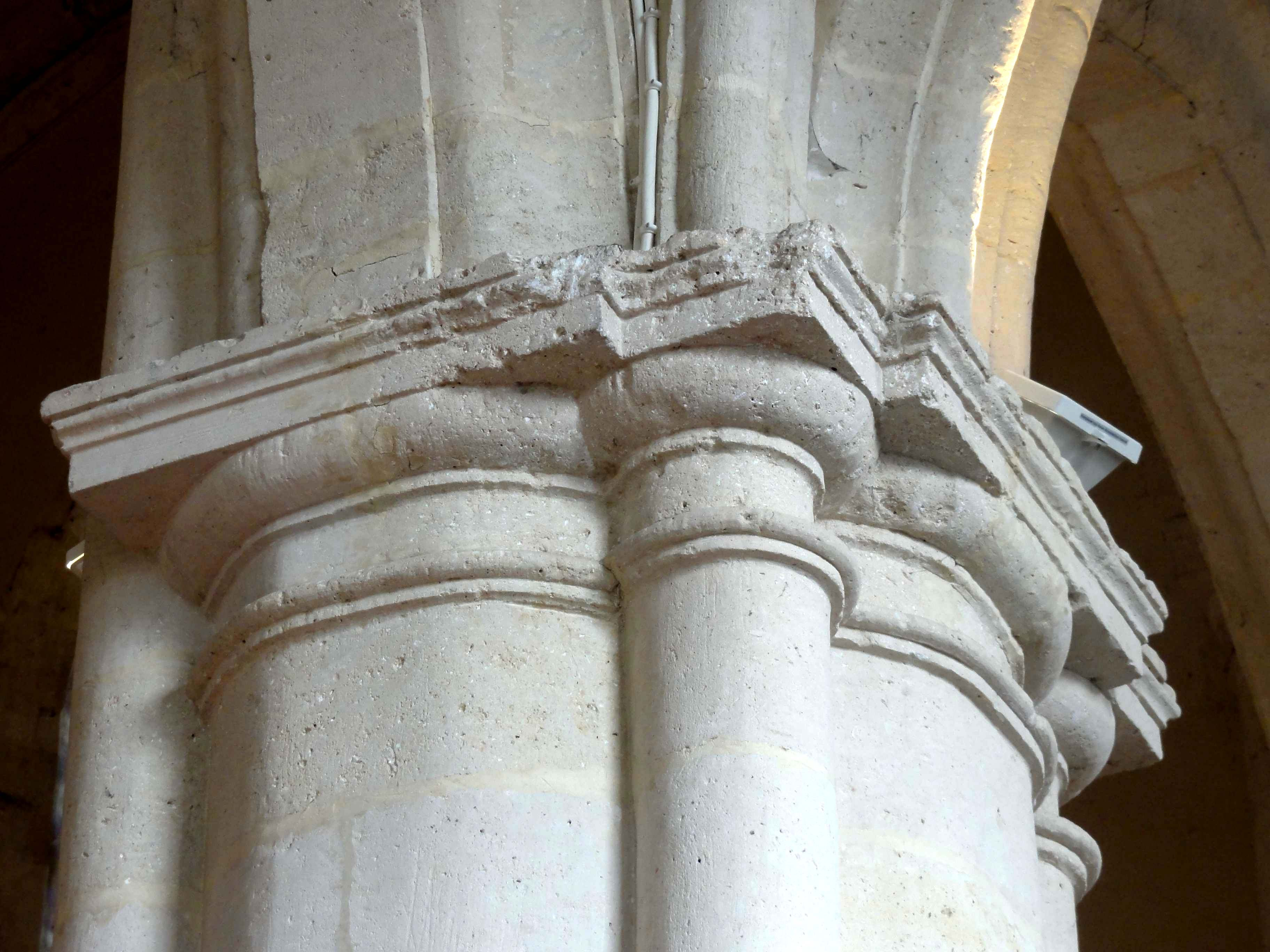 Intérieur de l'église - voir titre.